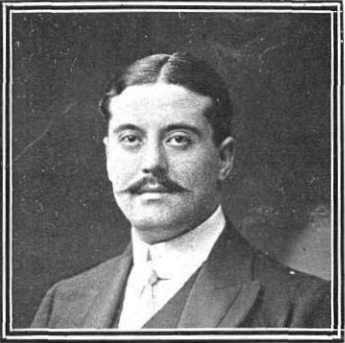 Conde de Santa Engracia, de Franzen.